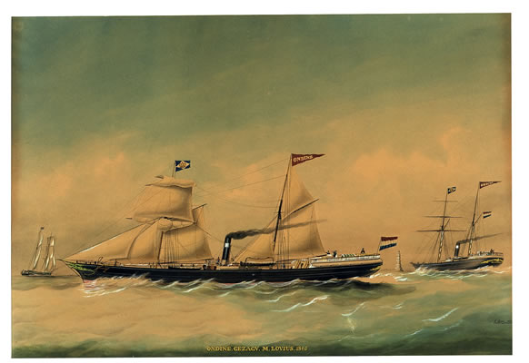 het eerste schip dat voor de Koninklijke Nederlandsche Stoomboot Maatschappij vaart: de ‘Ondine’.